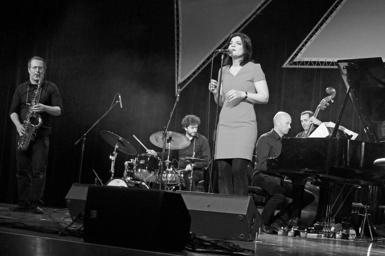 Jasmin Tabatabai & David Klein Quartett beim St. Ingberter Jazzfestival 2017